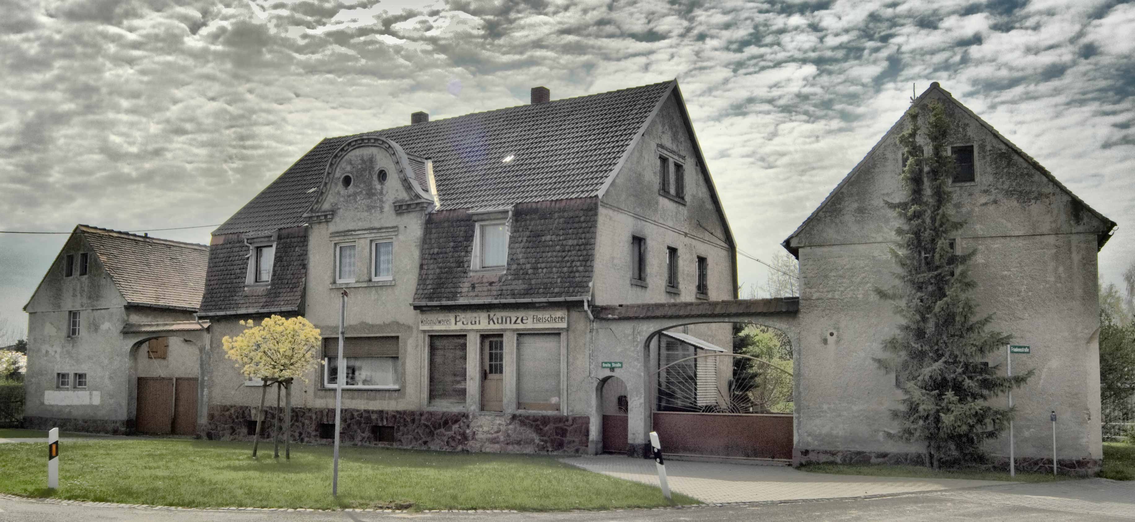 Hof Kunze mit Fleischerei um 1905, Ortsteil Liptitz, Gemeinde Wermsdorf, Sachsen